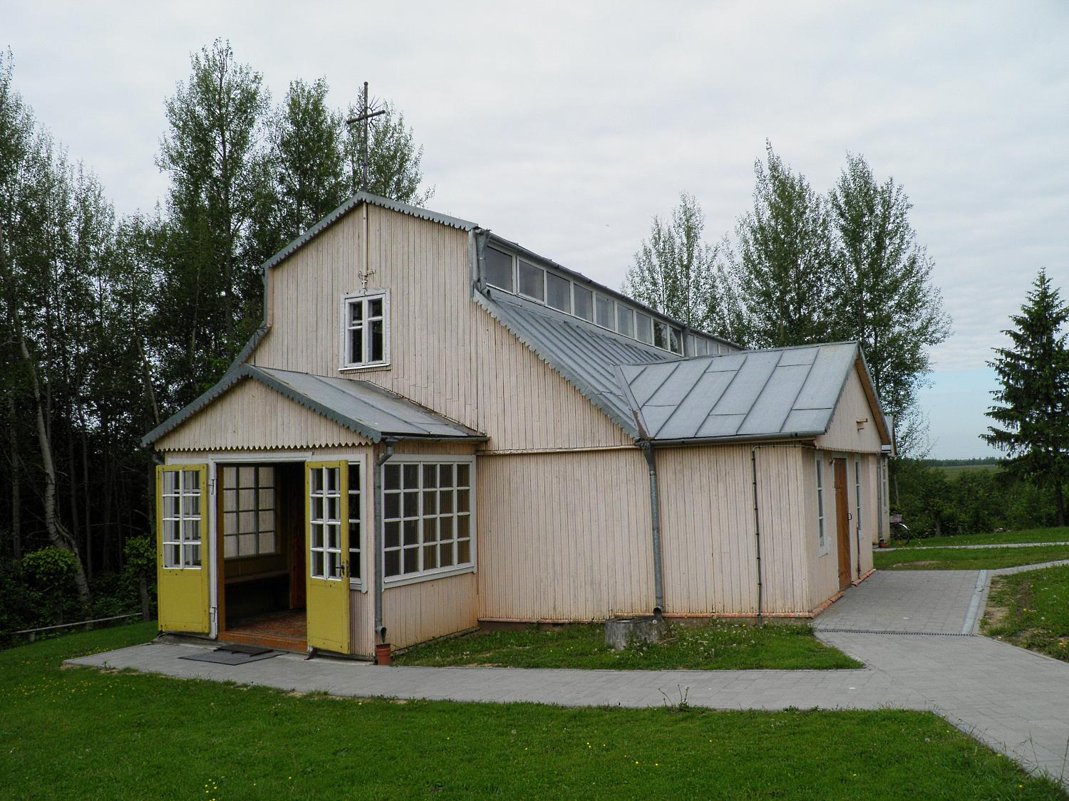 Juodupės Švč. Aušros Vartų Motinos bažnyčia (1)